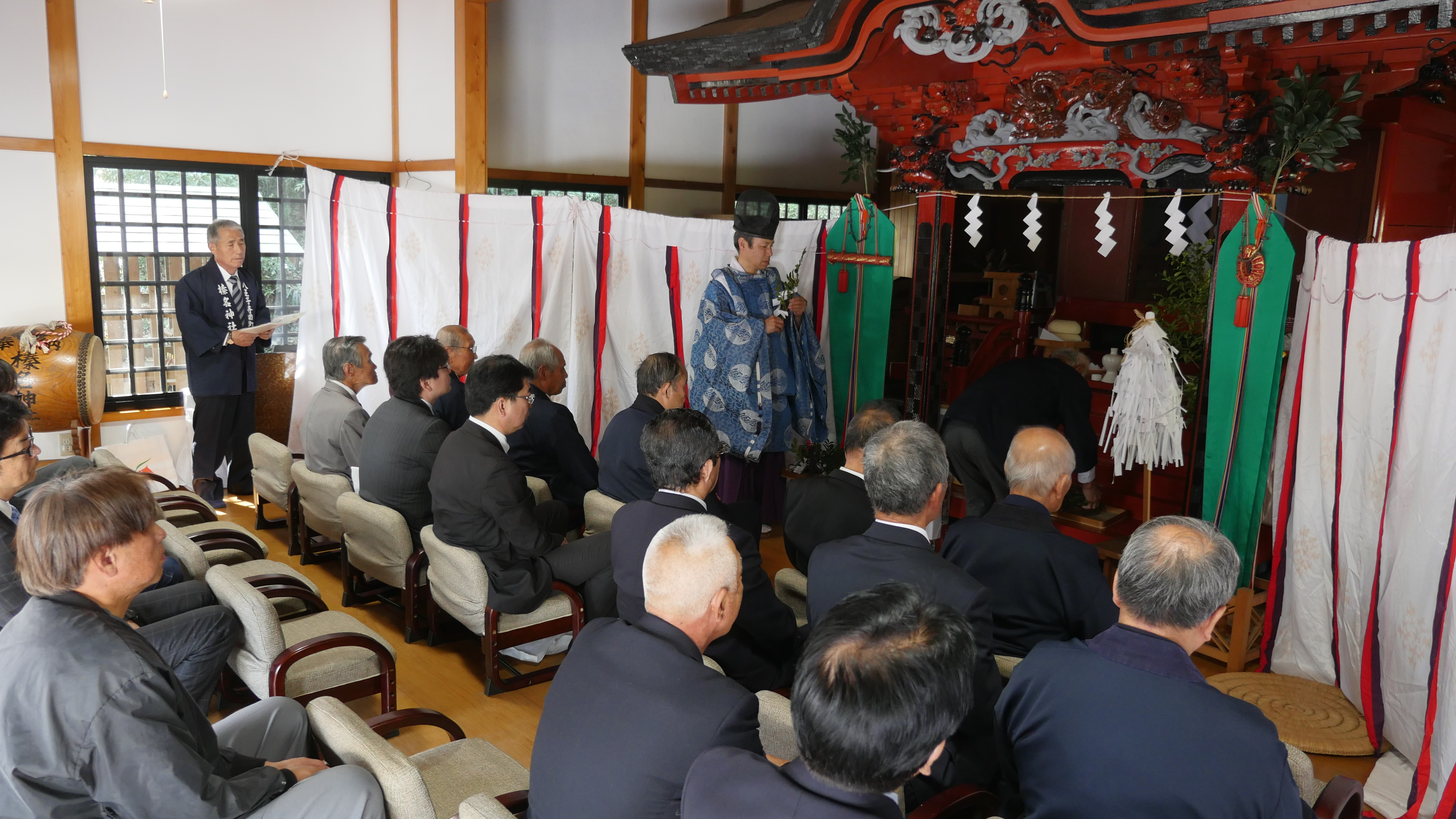 寺田の住民によって執り行われている。